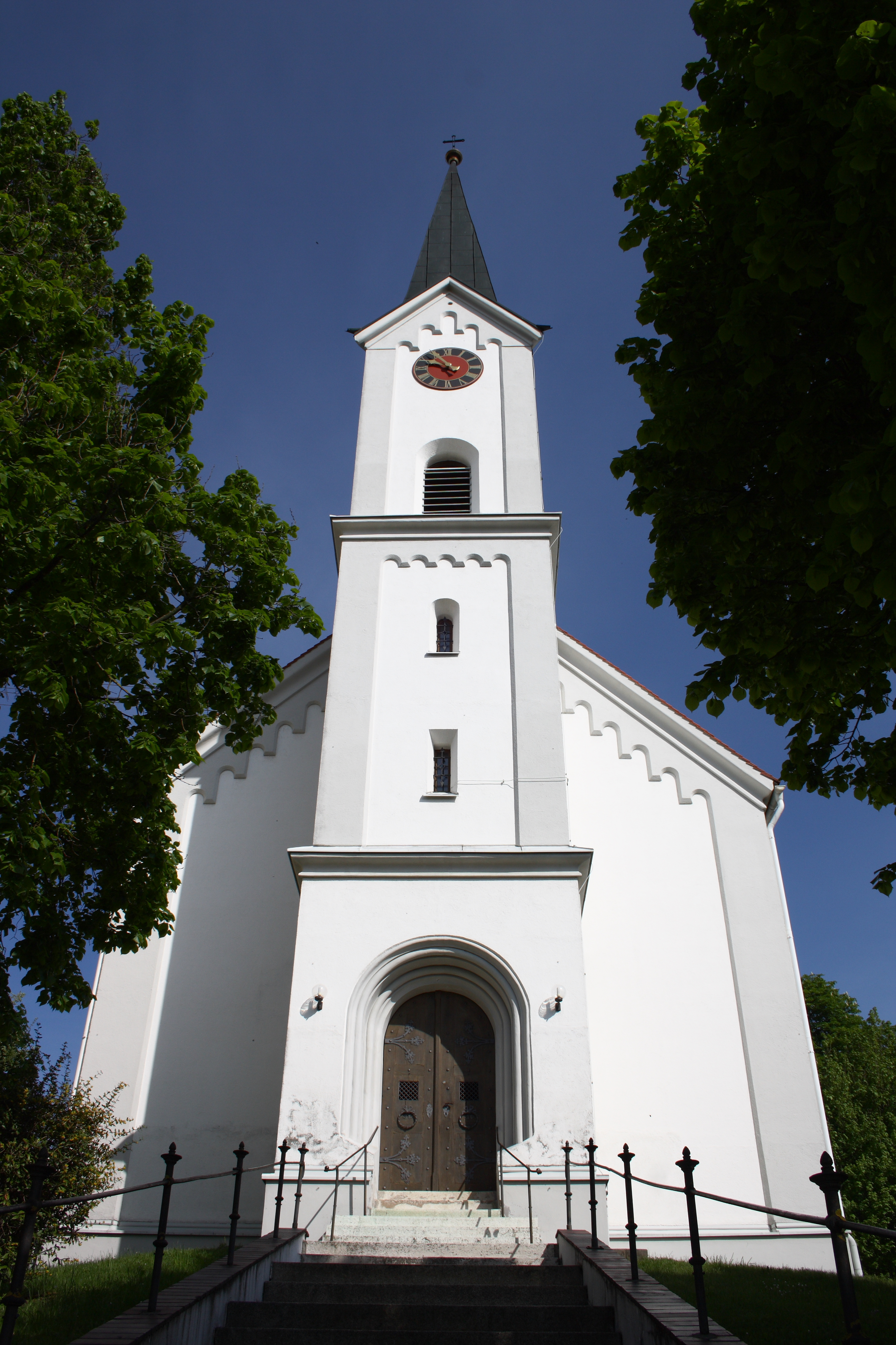 Katholische Kirche St. Felizitas in Roggden, einem Stadtteil von Wertingen, im Landkreis Dillingen an der Donau (Bayern), erbaut 1837, Turm mit Spitzhelm, Ansicht von Süden